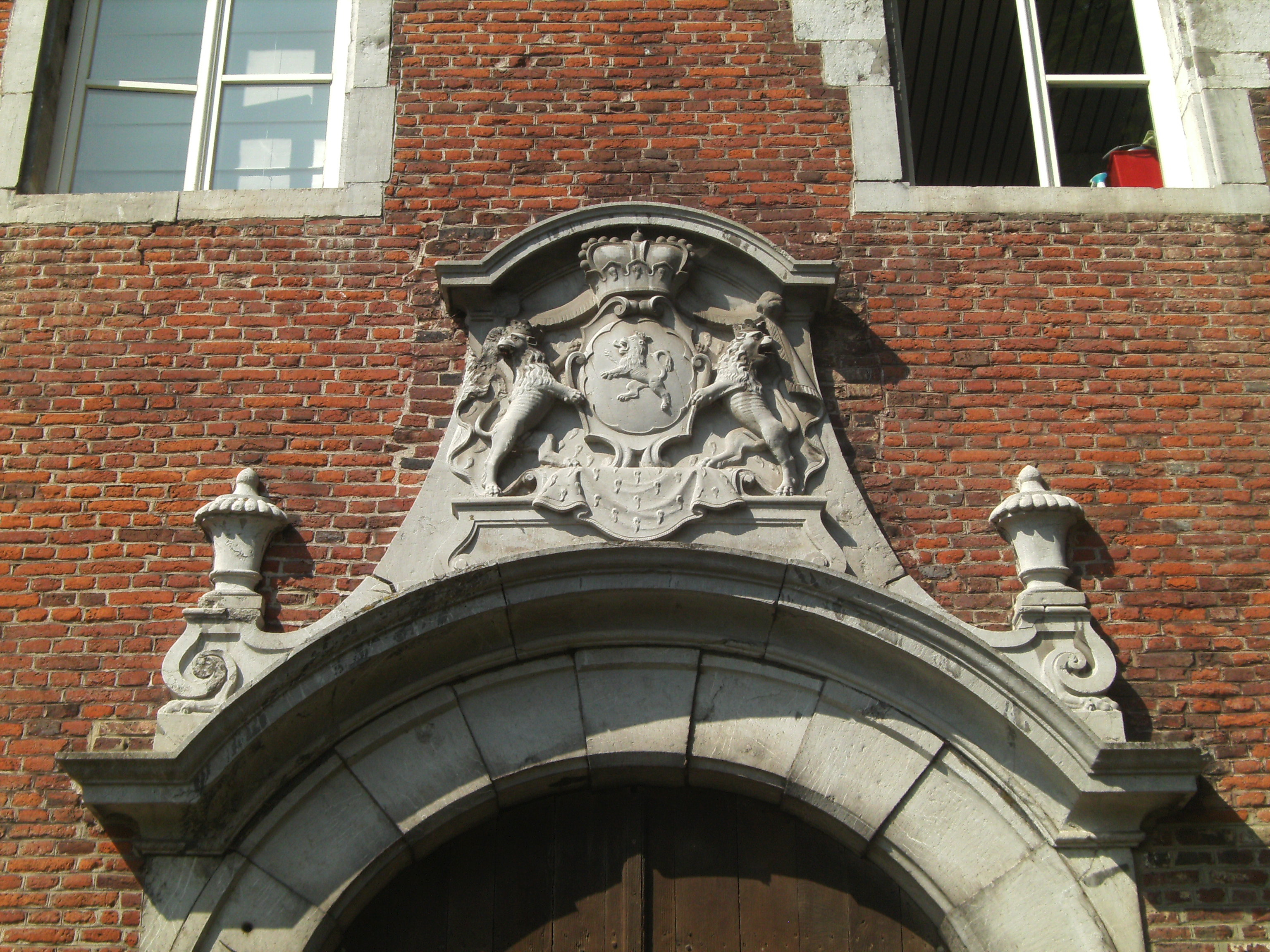 Château de Monceau-sur-Sambre (Charleroi - Belgique)